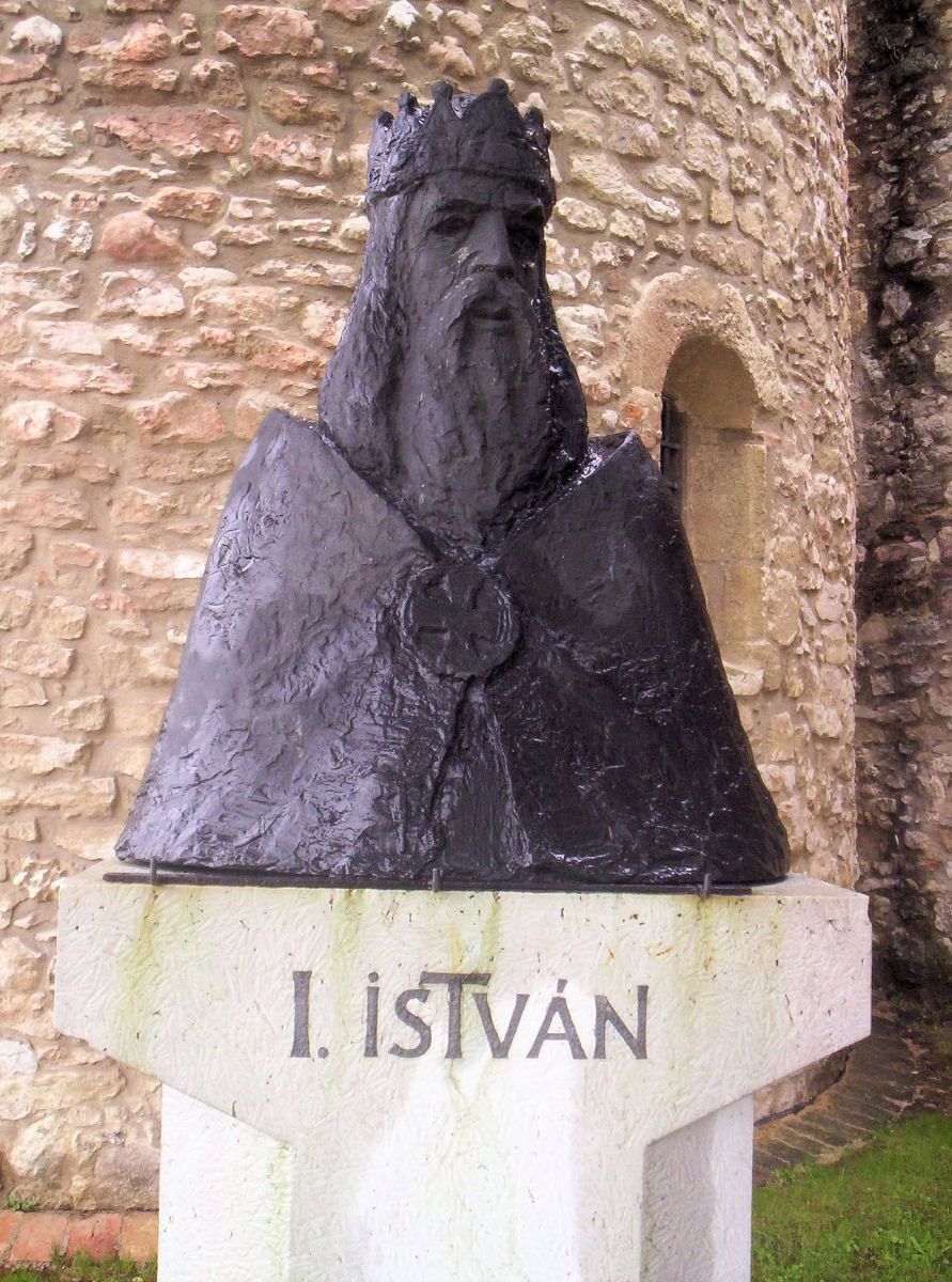 Szent István szobra Pécsváradon ; Borsos Miklós alkotása (1969) – photo taken by uploader User:Csanády